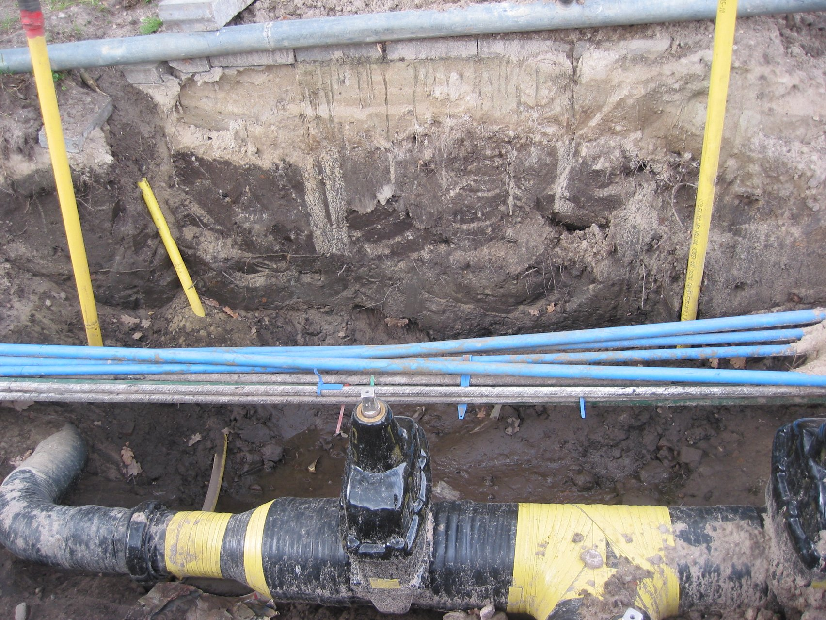 Ondergrondse leidingen. Pipes in ground